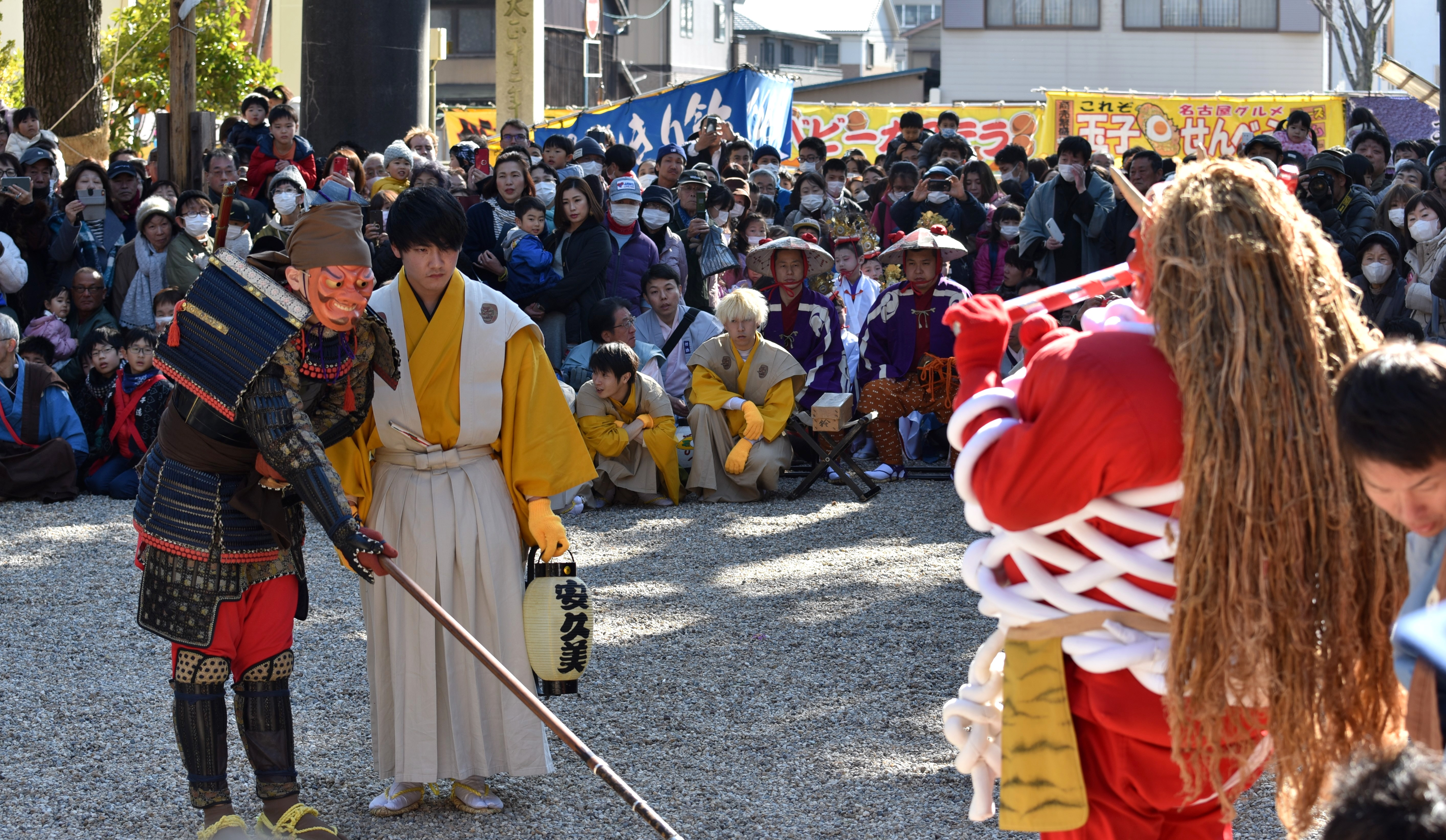 赤鬼と天狗のからかい